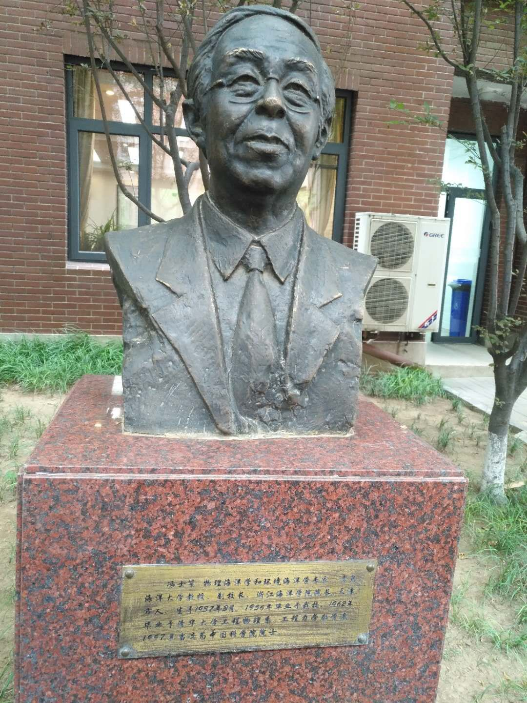 中国科学院院士冯士筰的雕塑，位于天津市耀华中学